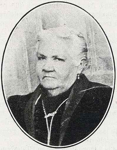 Isabel Le Brun de Pinochet (San Felipe, Txile, 1845 – 1870eko ekainaren 25) hezkuntzaren aldeztailea izan zen, Txilen neskek hezkuntzarako sarbidea izatea ekarri zuena.